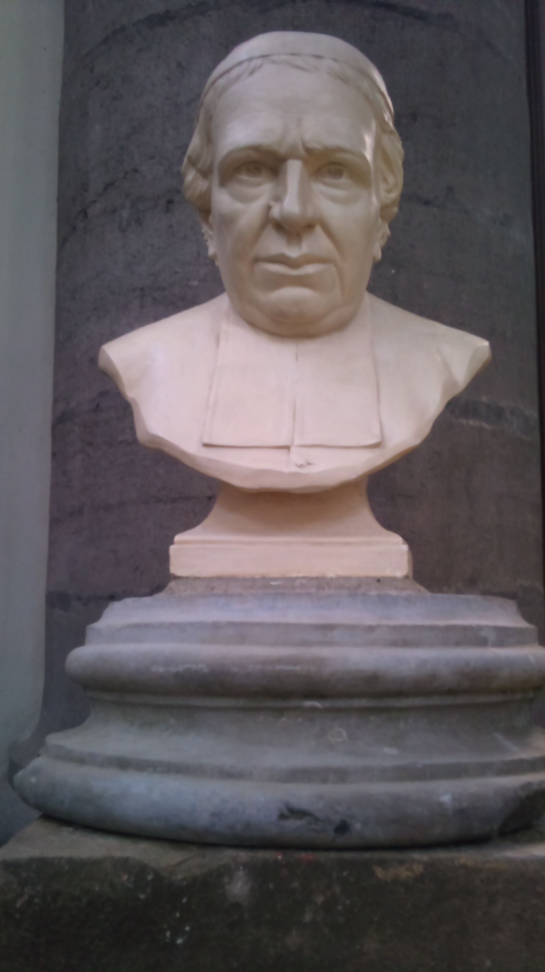 Douai - Collégiale Saint-Pierre - Jean-Batiste Debrabant 1801 1880